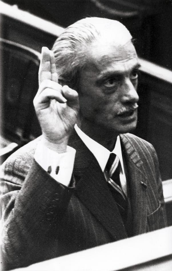 J.A.Mommersteeg (KVP) tijdens de eedaflegging in de Tweede Kamer. Den Haag, Nederland, 18 mei 1976.